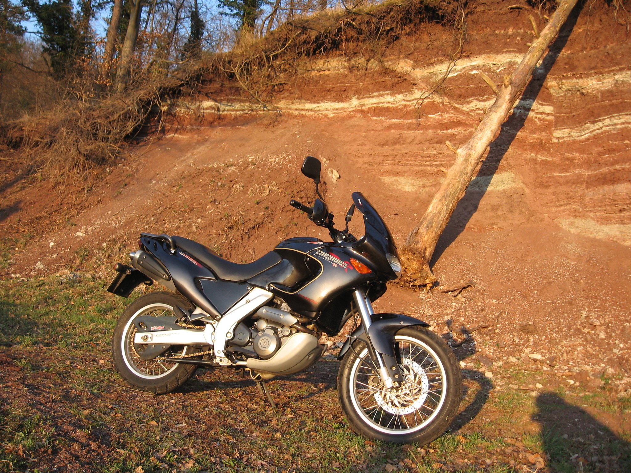 Stuttgart